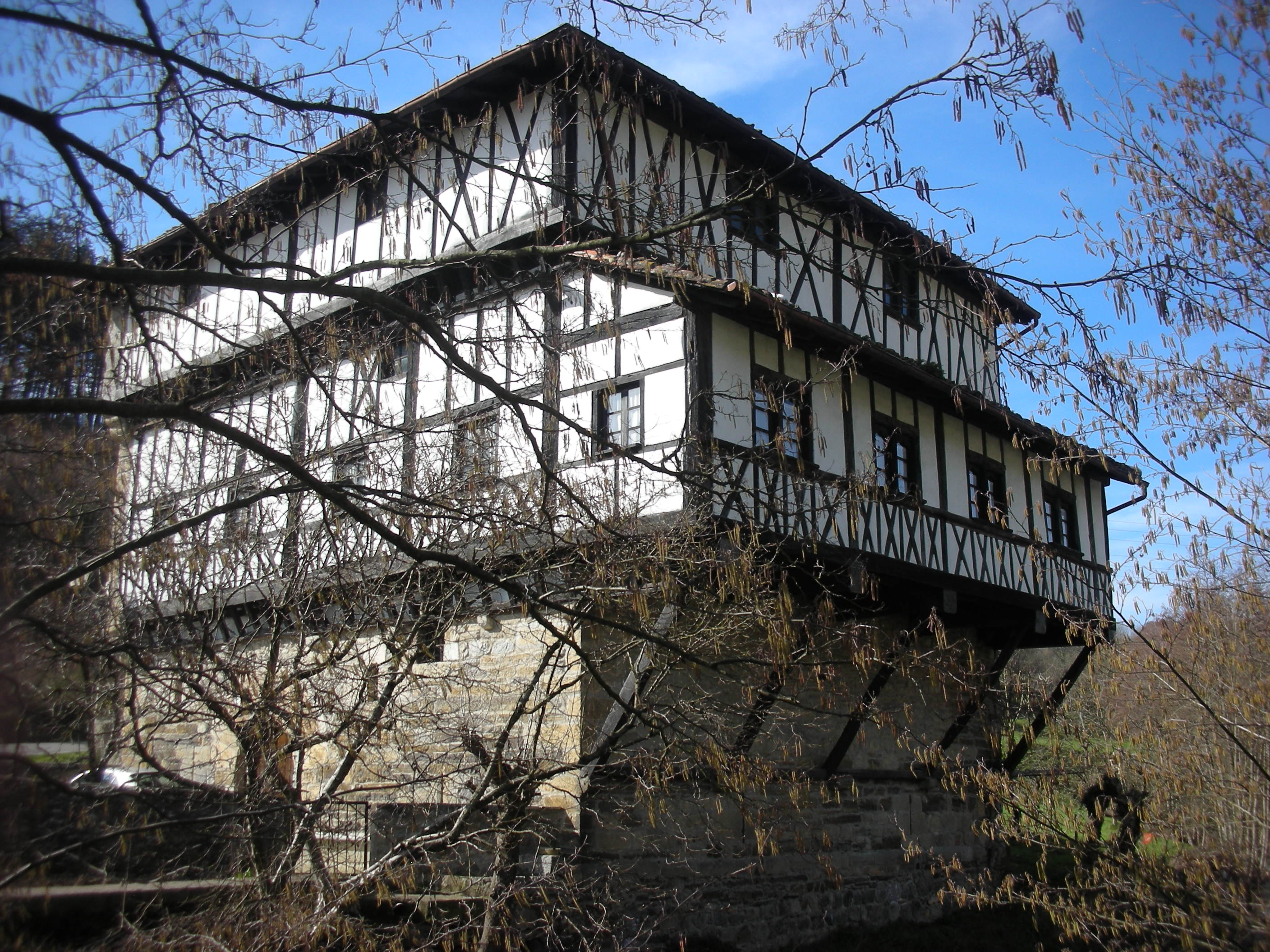 Casa -Torre Apezteguizarra, en Betelu, Navarra, España.